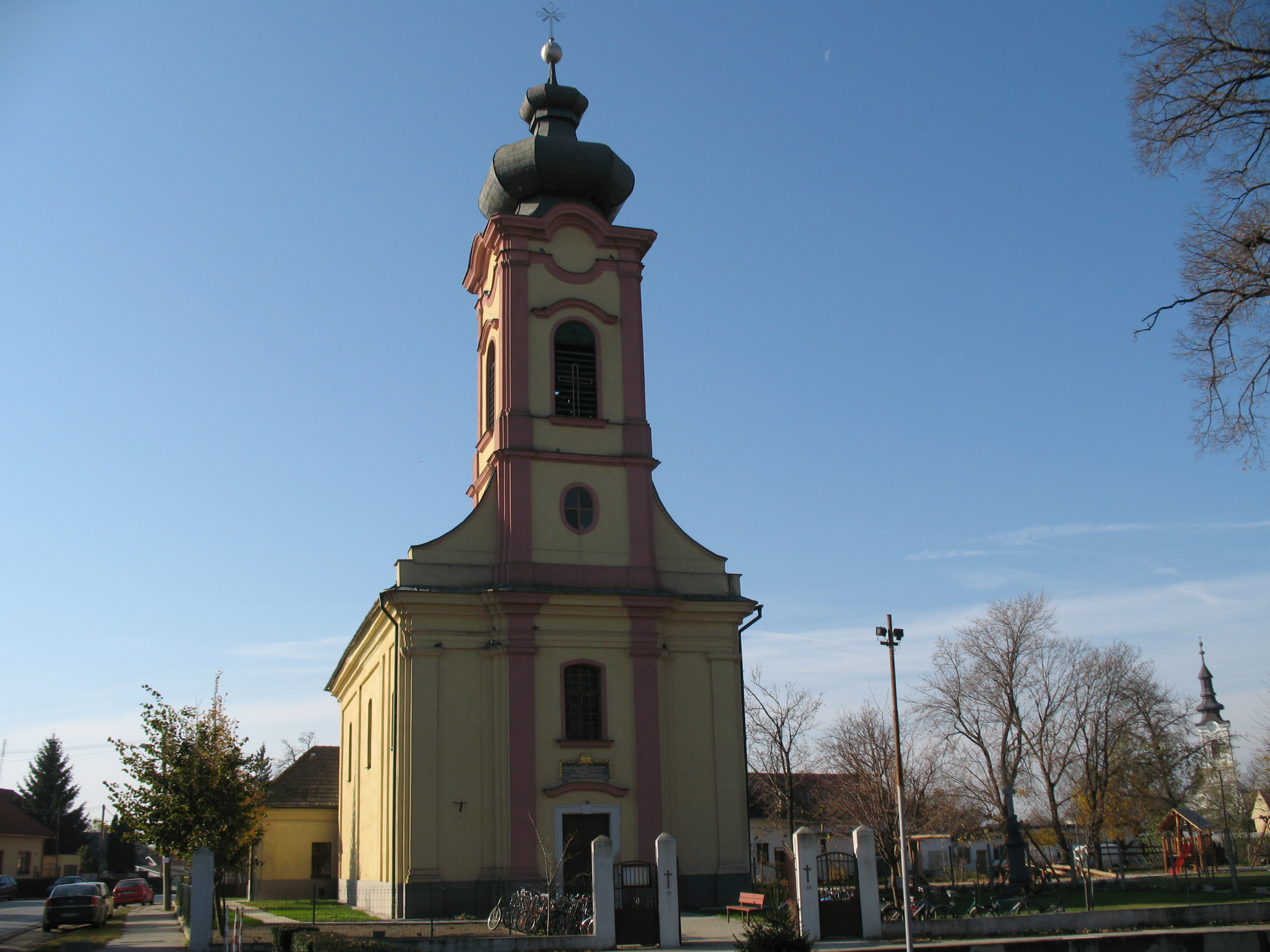 Vágfarkasd templom